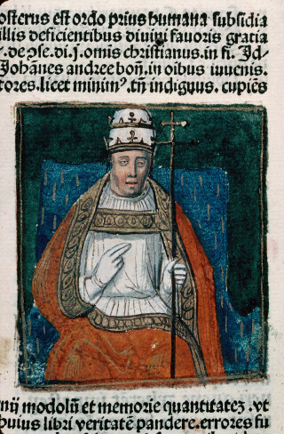 Boniface VIII. Enluminure du XVème siècle.